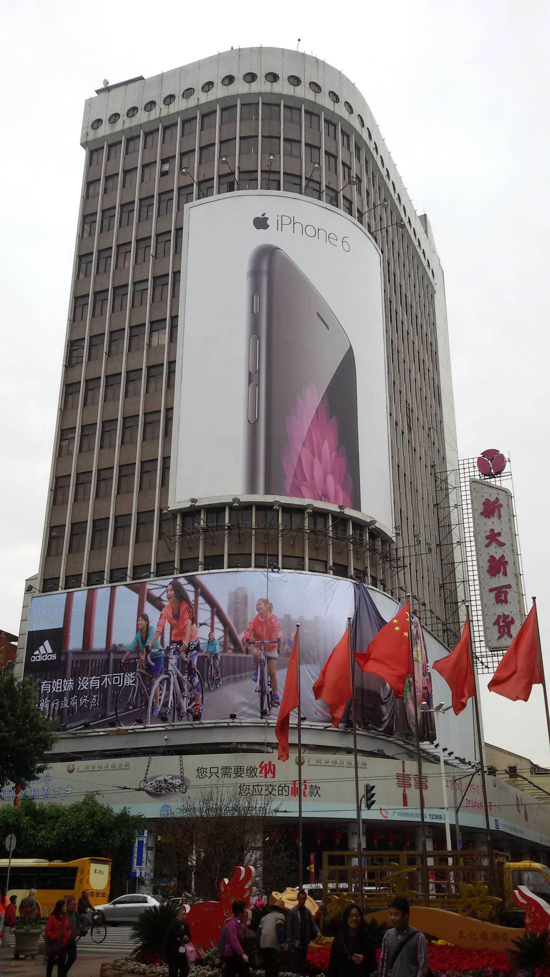 粵語: 新大新總店（中山五路）